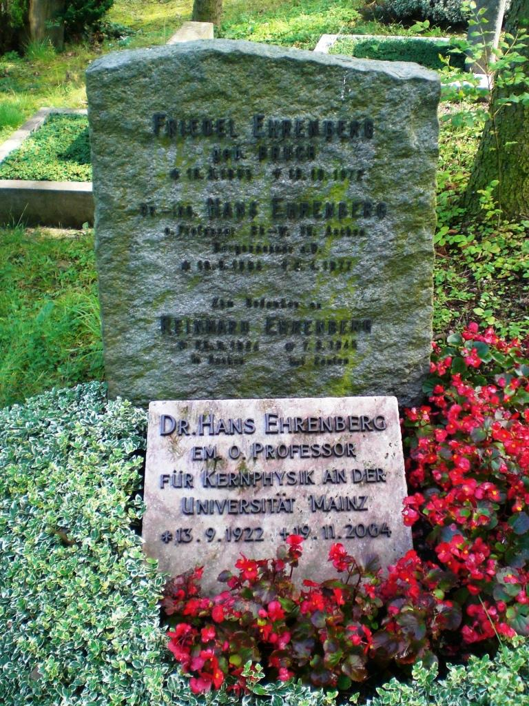 Grab des Kernphysikers Hans Ehrenberg (1922-2004) auf dem Friedhof Poppelsdorf in Bonn.